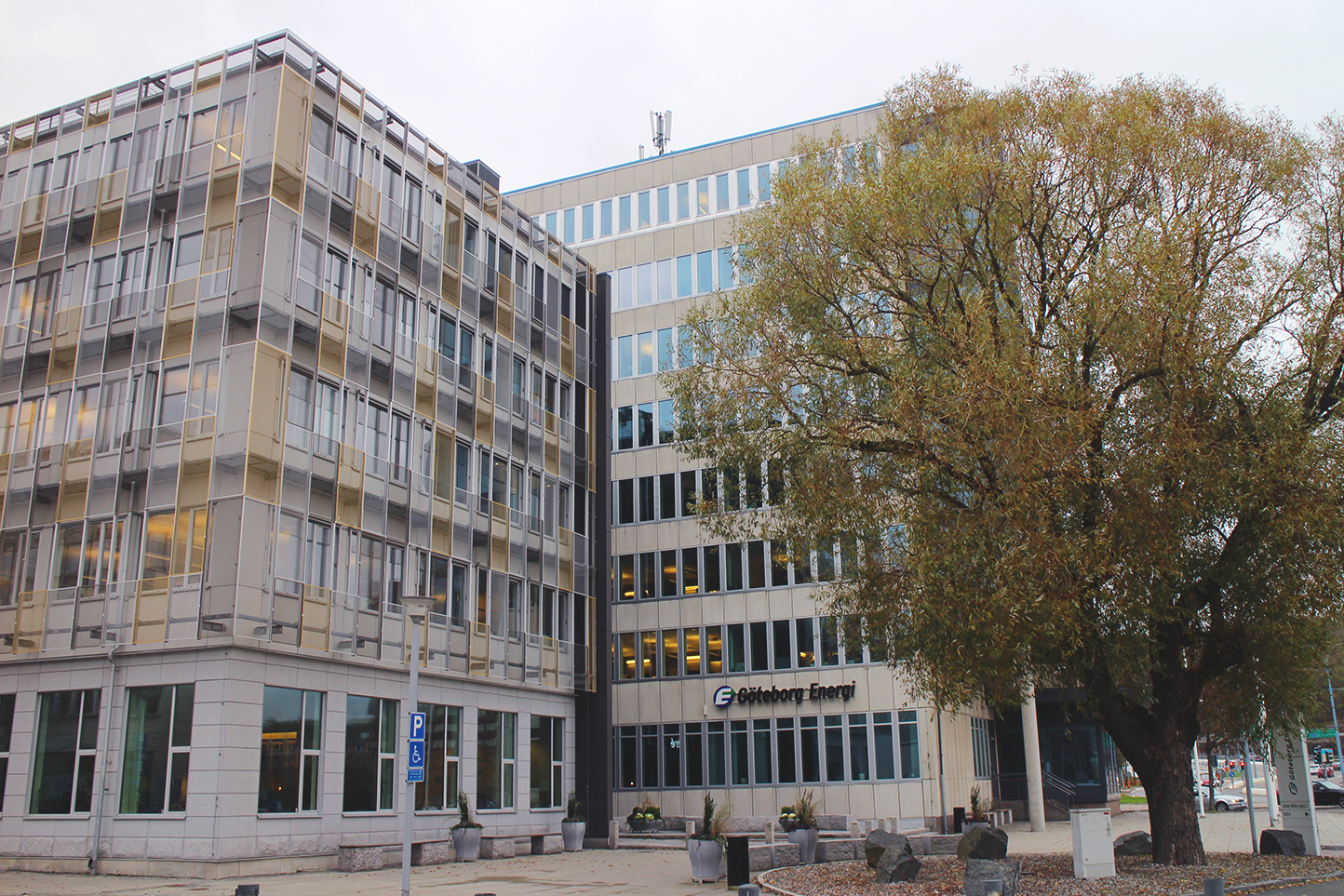 Göteborg Energis huvudkontor vid Rantorget, Göteborg.